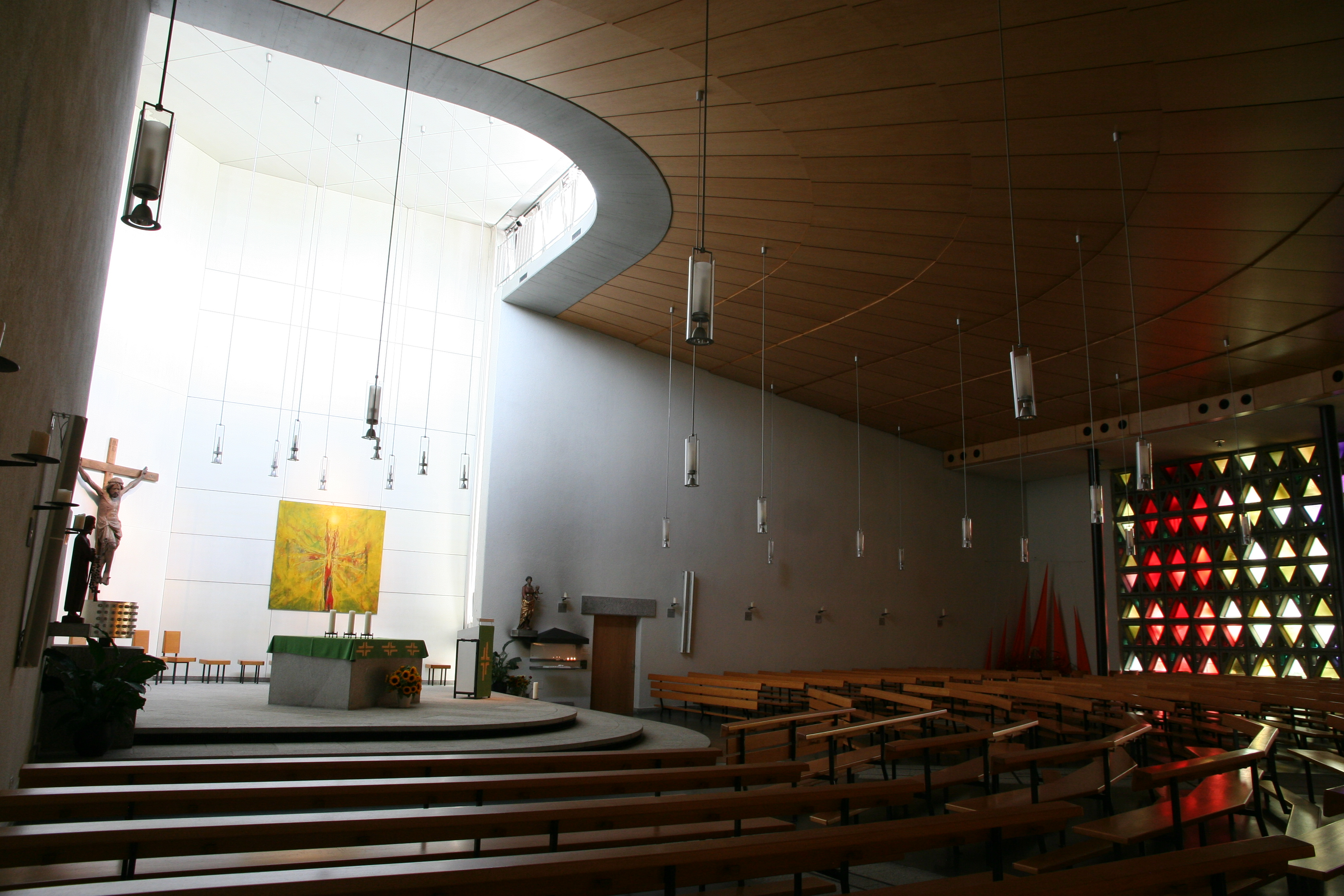 Römisch-katholische Pfarrkirche Bruder Klaus Biel